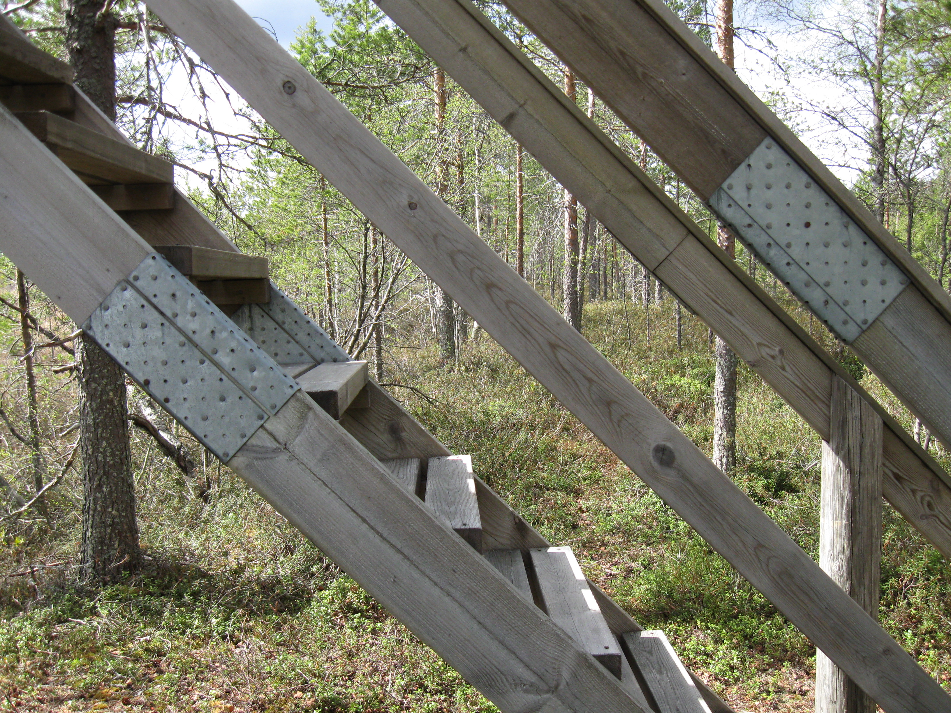 Reikä- eli naulauslevyjä lintutornin portaissa.